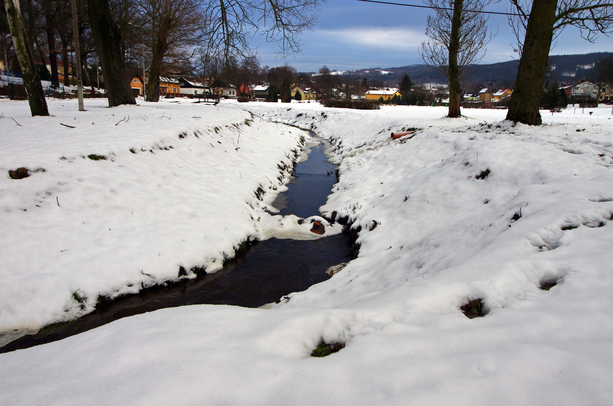 Dolní Rychnov, Dolnorychnovský potok, okres Sokolov